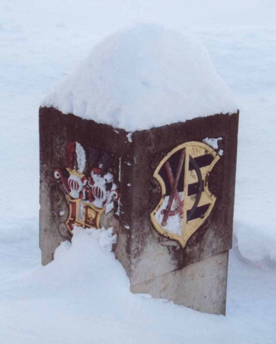 Zinnwald-Georgenfeld: alter Grenzstein am Huthaus (li. Bünauisches wWappen der Herrschaft Lauenstein, re. kursächsisches Wappen des Amtes Altenberg)